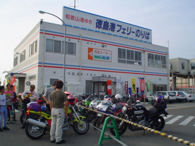 Pier of Tokushima Port (徳島小松島港) for Wakayama (Nankai Ferry), Tokushima City, Tokushima Pref, Japan